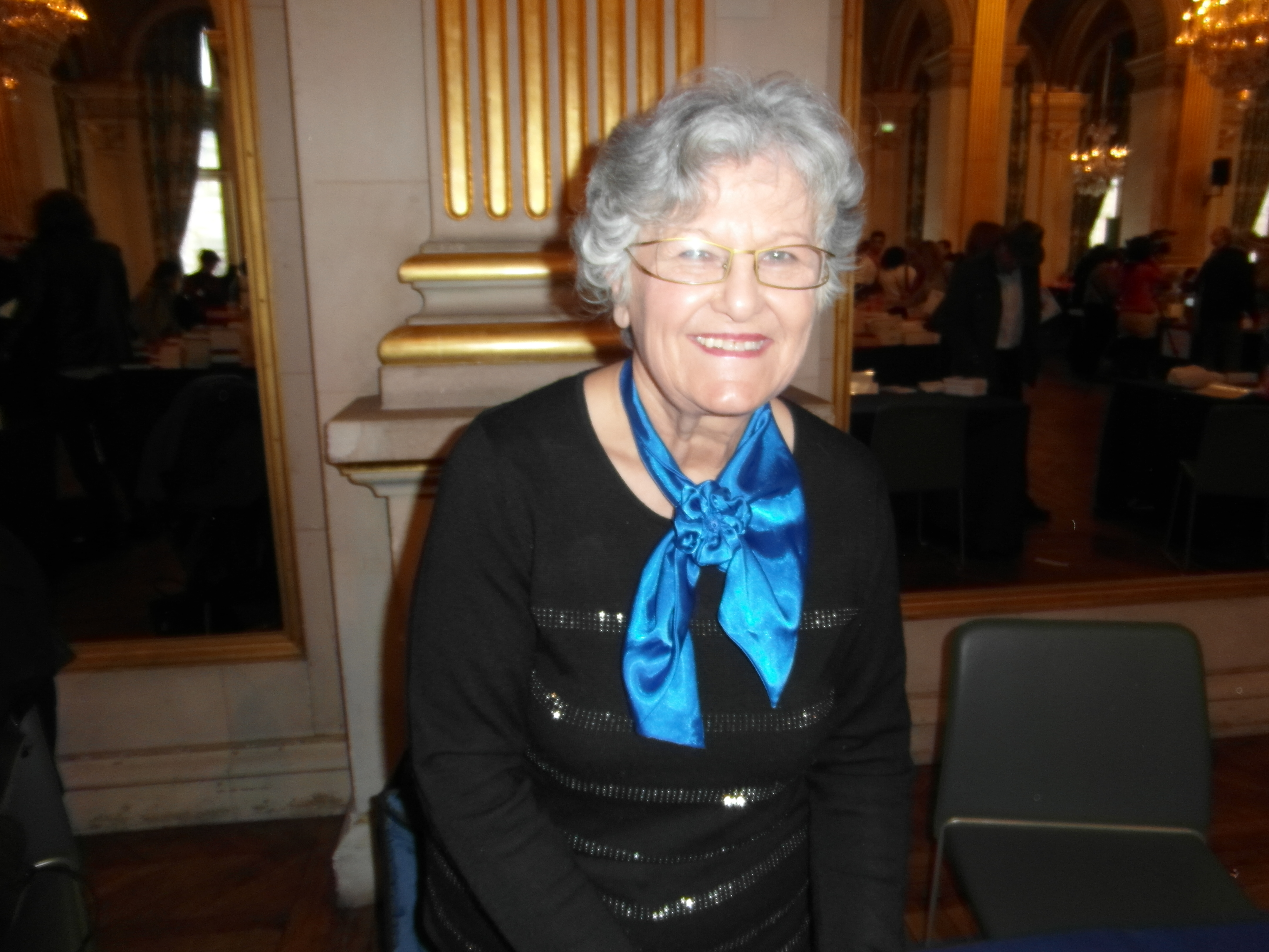 20e Maghreb des Livres, Paris, 8 février 2014